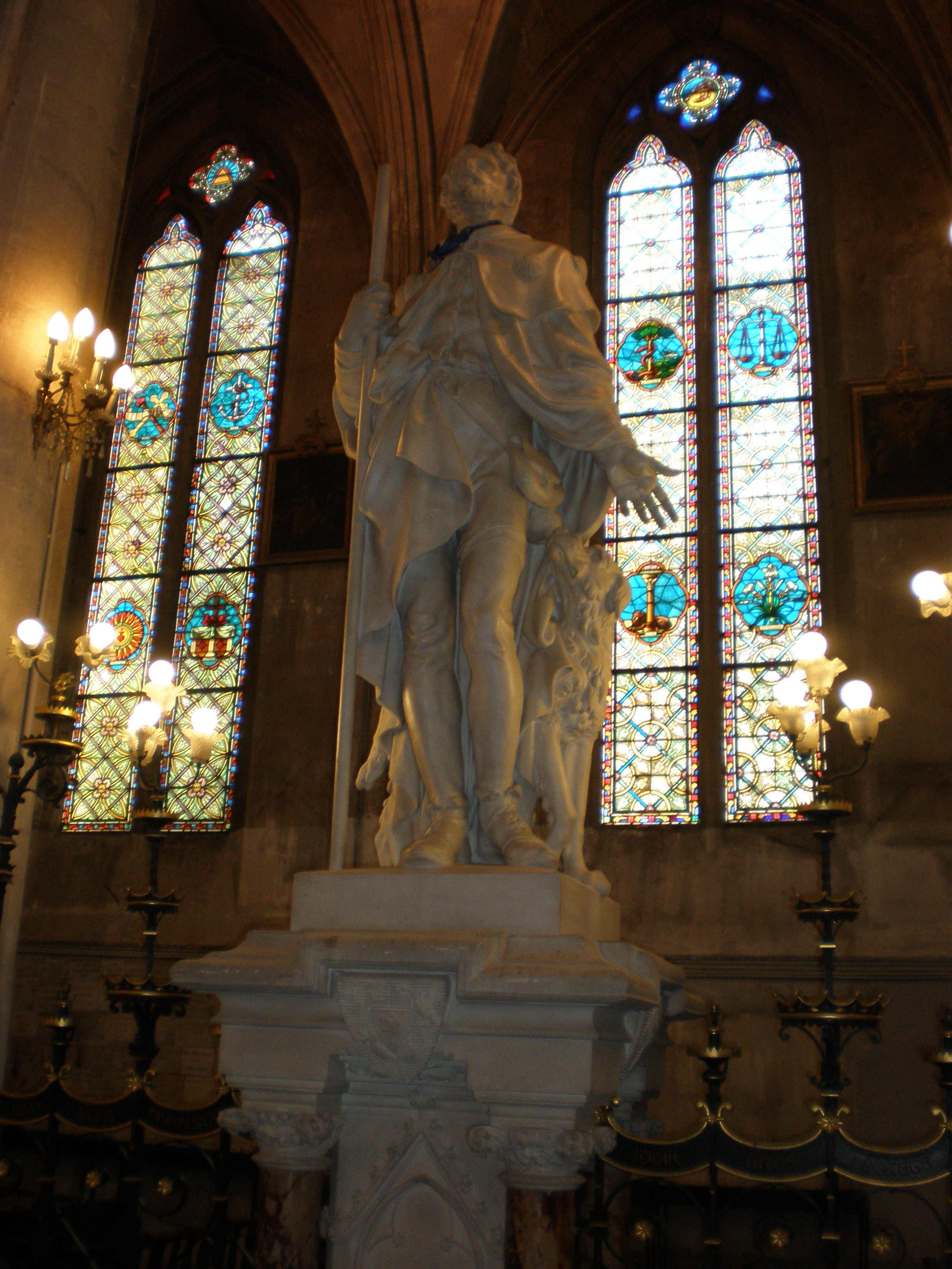 la statue de Saint Roch, né à Montpellier, dans l'église Saint-Roch de Montpellier (Hérault)